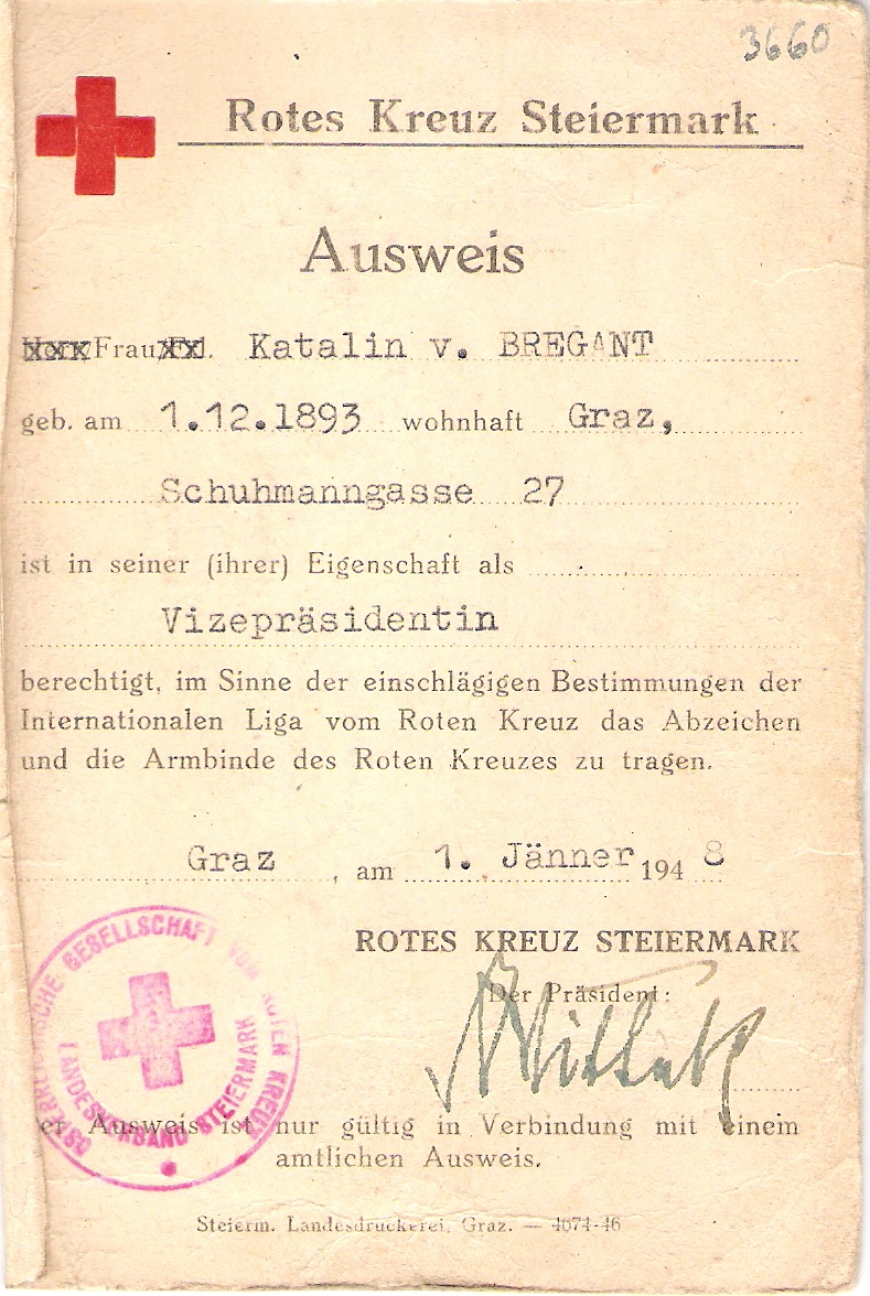 Katharina Bregant: Ausweis der Vizepräsidentin des Roten Kreuz Steiermark